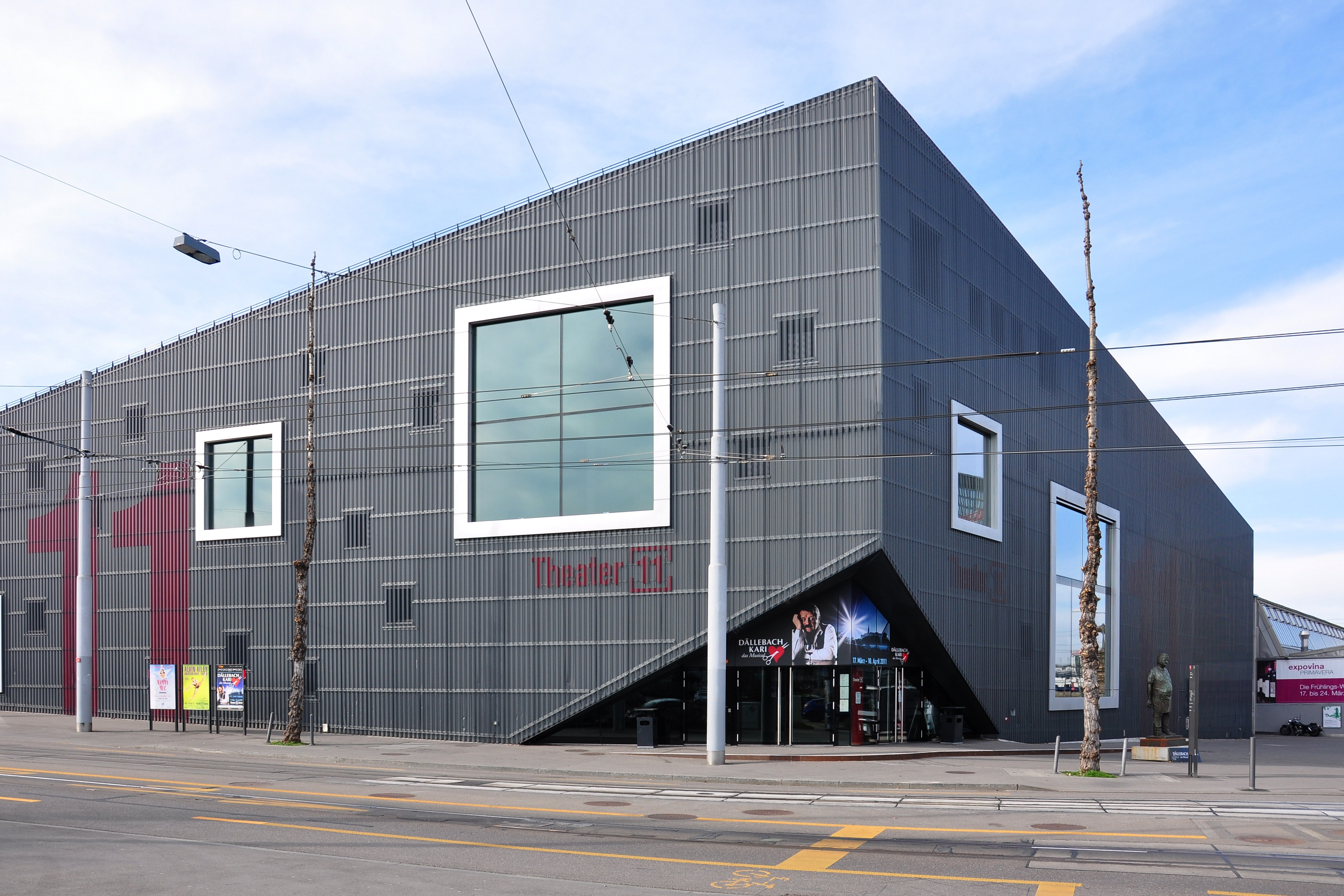 Theater 11 in Zürich-Oerlikon (Switzerland)